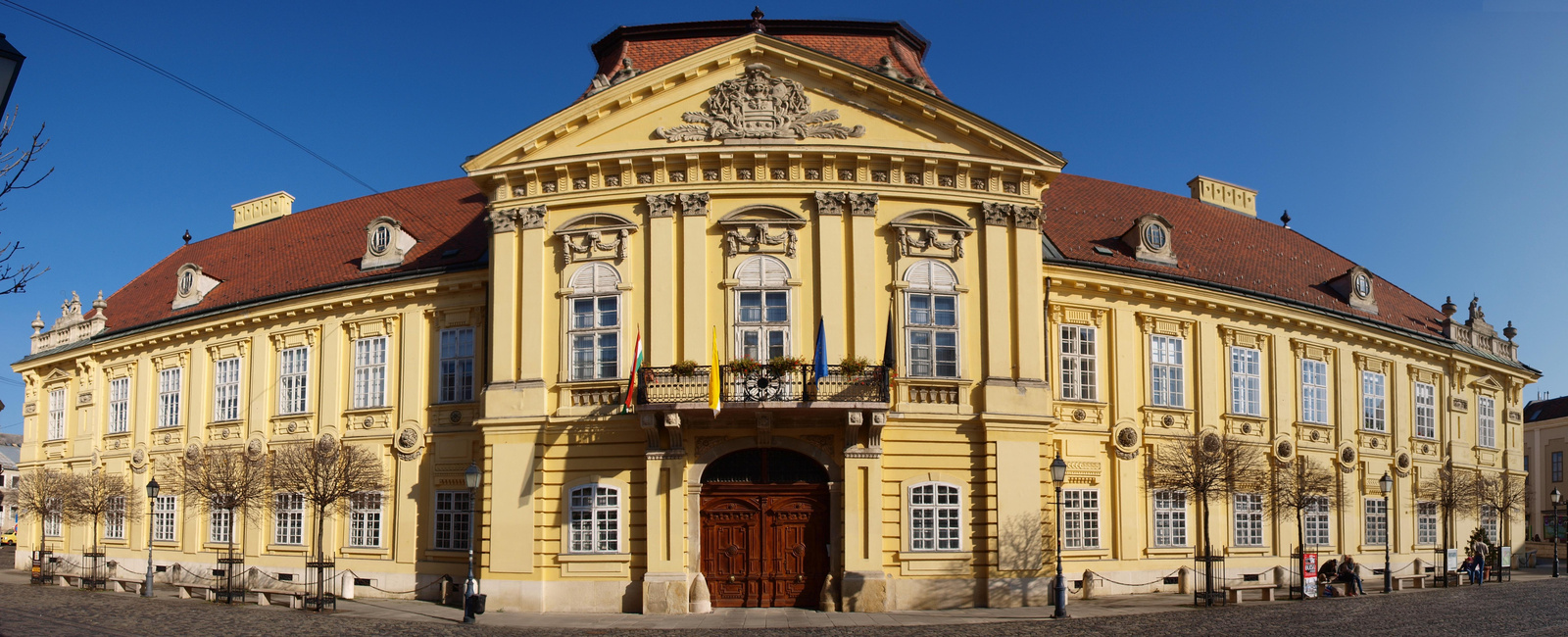 Püspöki palota (Székesfehérvár, Városház tér 5.) This is a photo of a monument in Hungary, Identifier: 3918